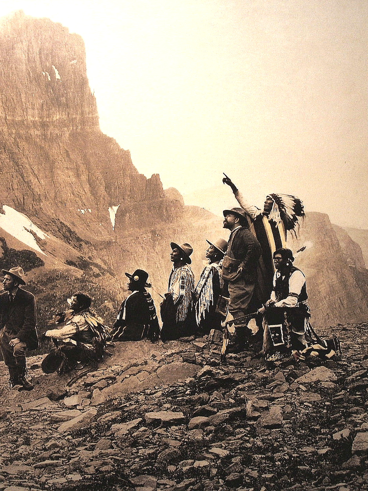 Genova, Castello d'Albertis, Museo delle Culture del Mondo - Edward Sheriff Curtis durante un suo viaggio